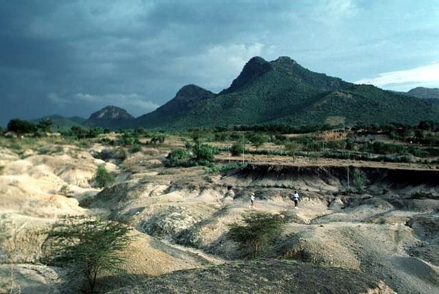 Homa Mountain in Kenya